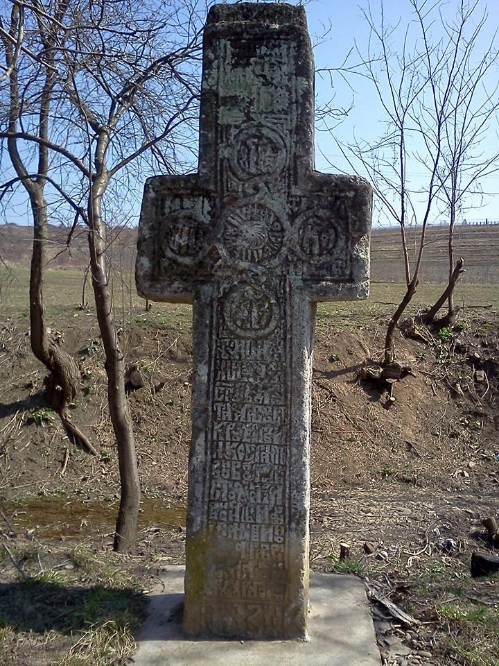 Cruce de pomenire (de drum)